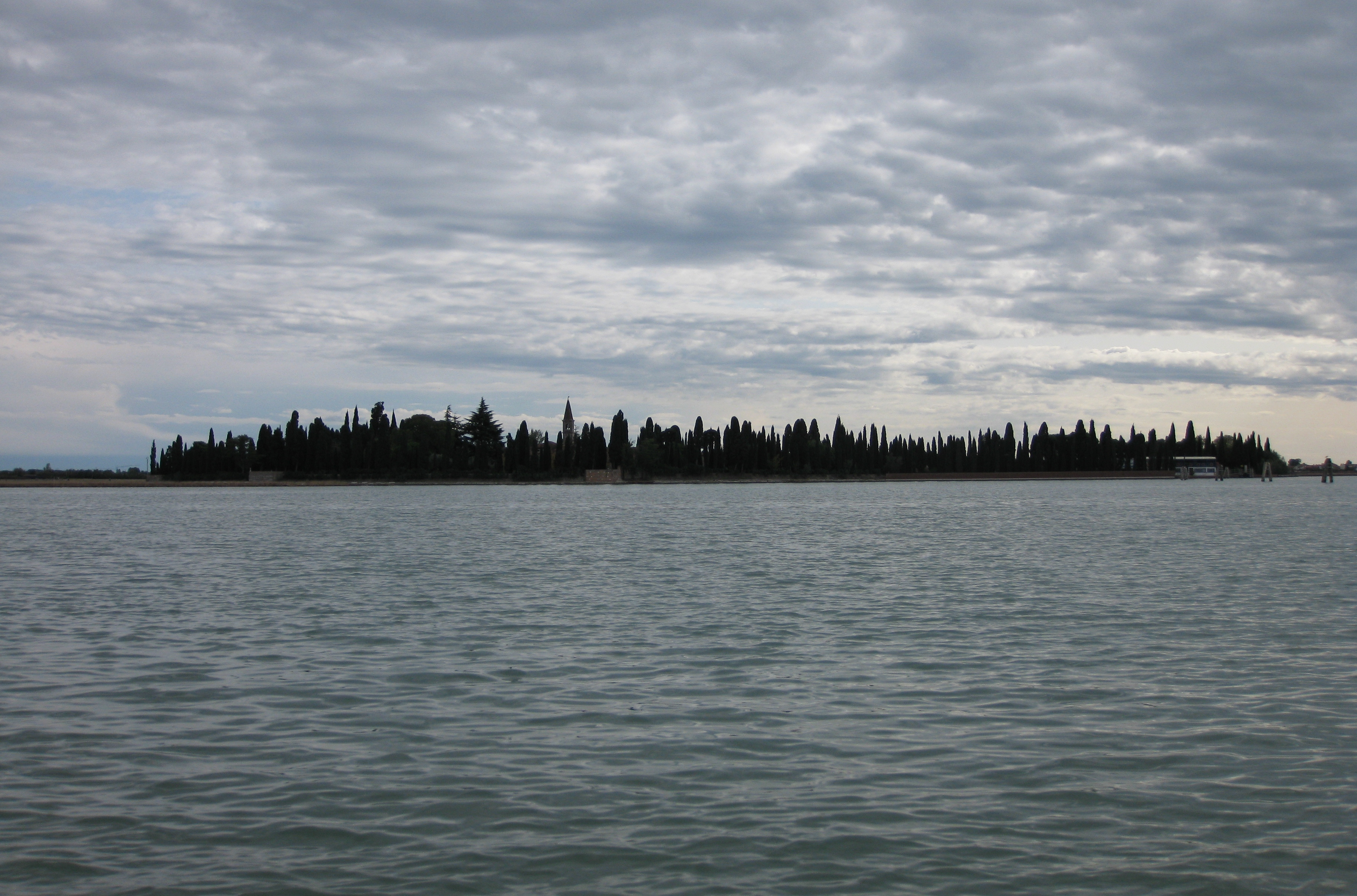 Isola di San Francesco del Deserto a Venezia.